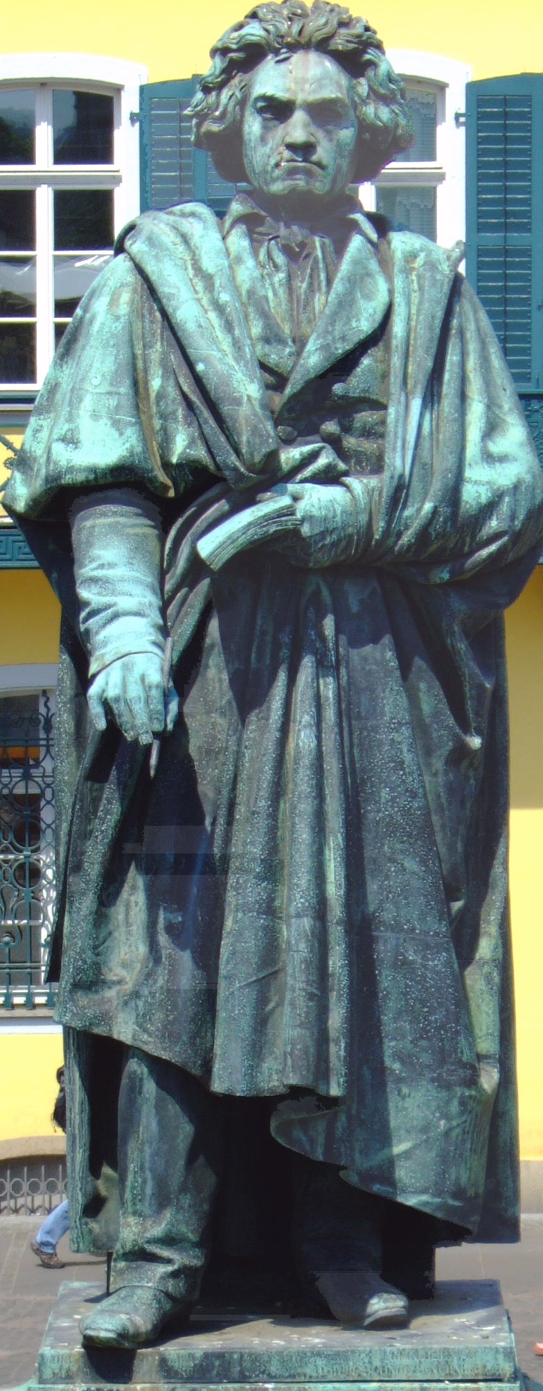 Beethoven-Denkmal von Ernst Hähnel und Jakob Daniel Burgschmiet (1796–1858) Alternative namesJakob Daniel BurgschmietDescriptionGerman sculptor and university teacherDate of birth/death11 October 17967 March 1858Location of birth/deathNurembergNurembergWork locationBamberg, Bonn, Möhra, Nuremberg, PragAuthority control : Q1609473 VIAF: 40148765 GND: 117168971 auf dem Münsterplatz in Bonn